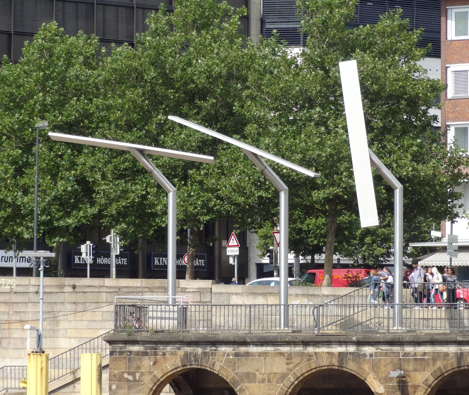 Windobjekt des Künstlers Hein Sinken